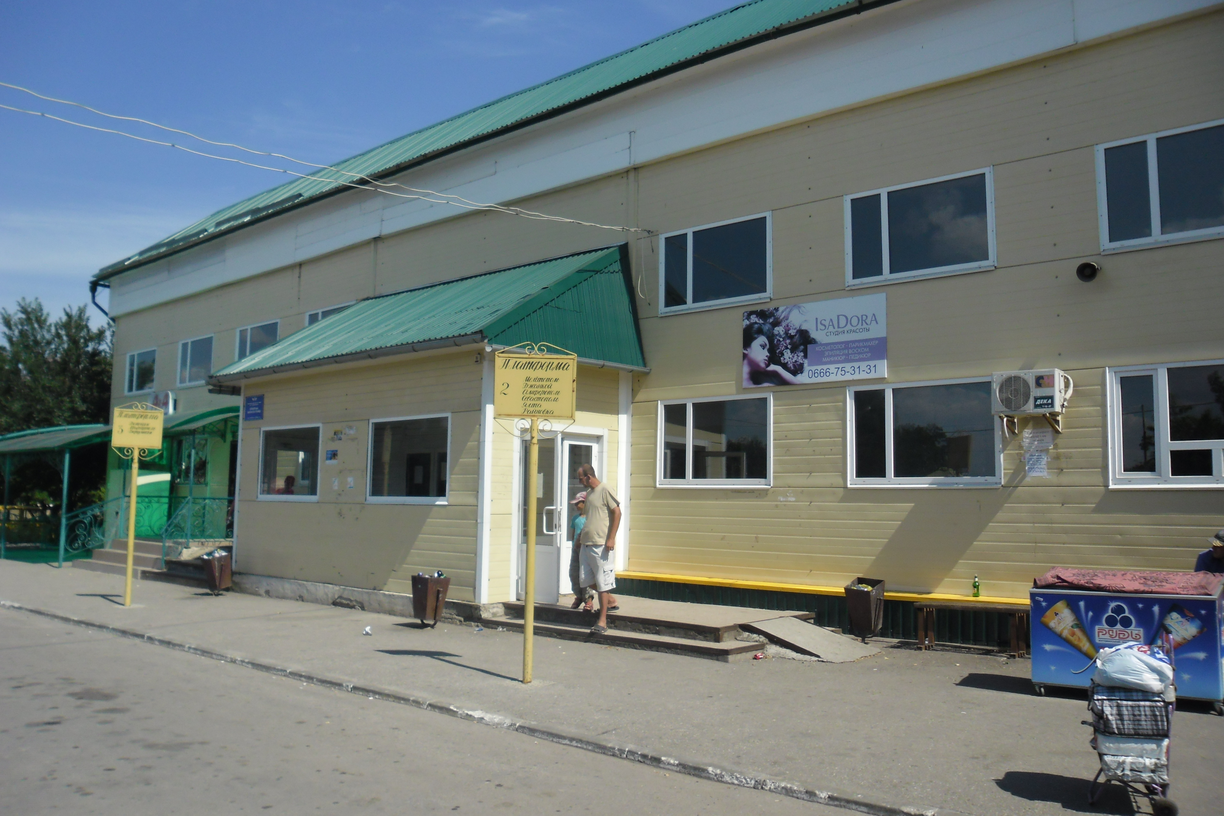 Фото